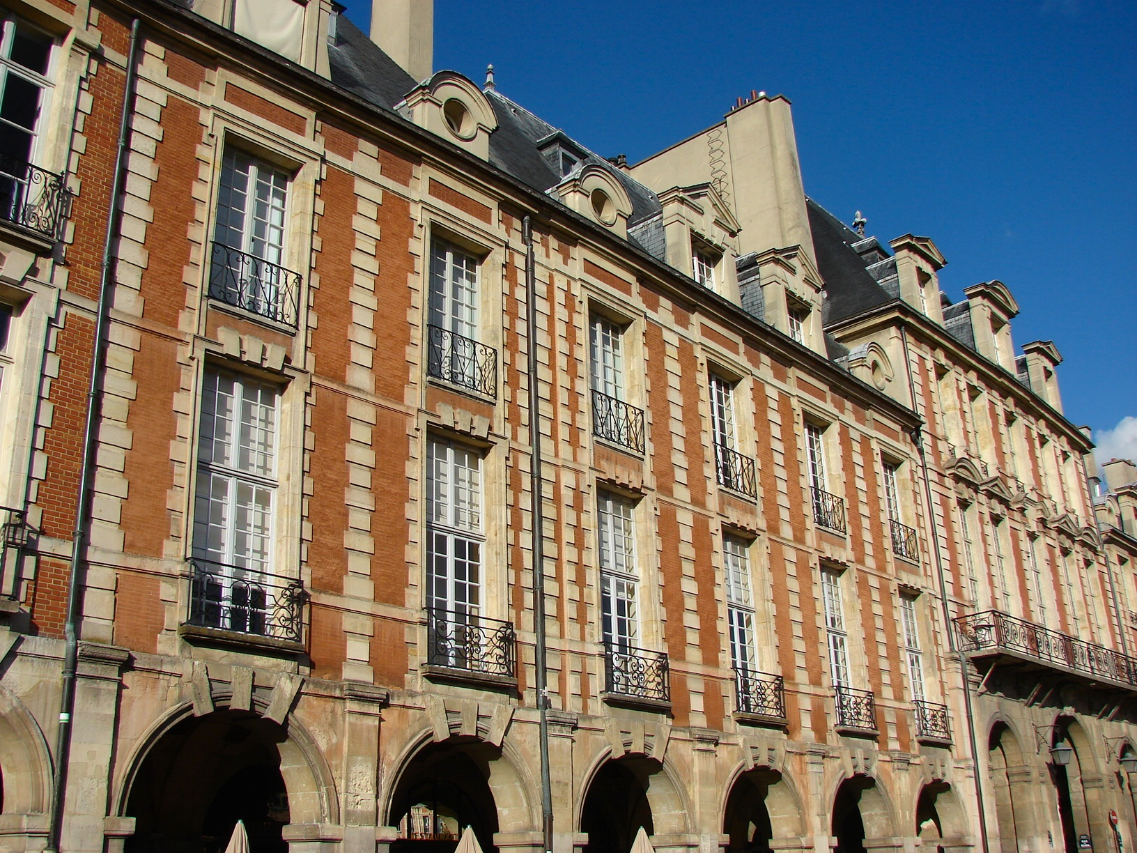 Hôtel de l'Escalopier - 25 Place des Vosges - Paris 3 Vue générale de la façade avec le Pavillon de la Reine en fin de perspective. .